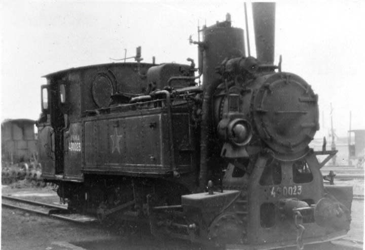 Локомотив типу 490 в Берегові